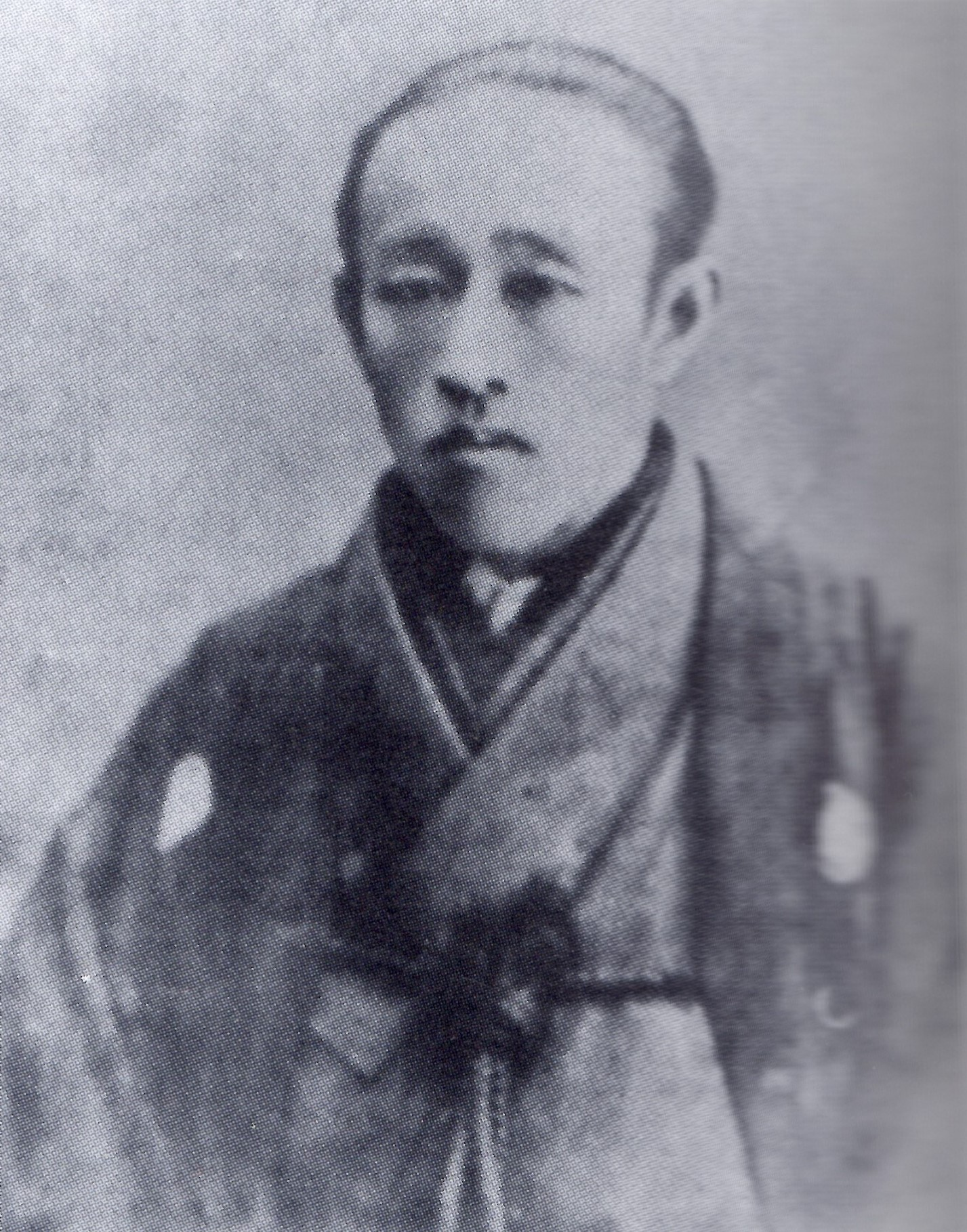 松平頼英の肖像写真。